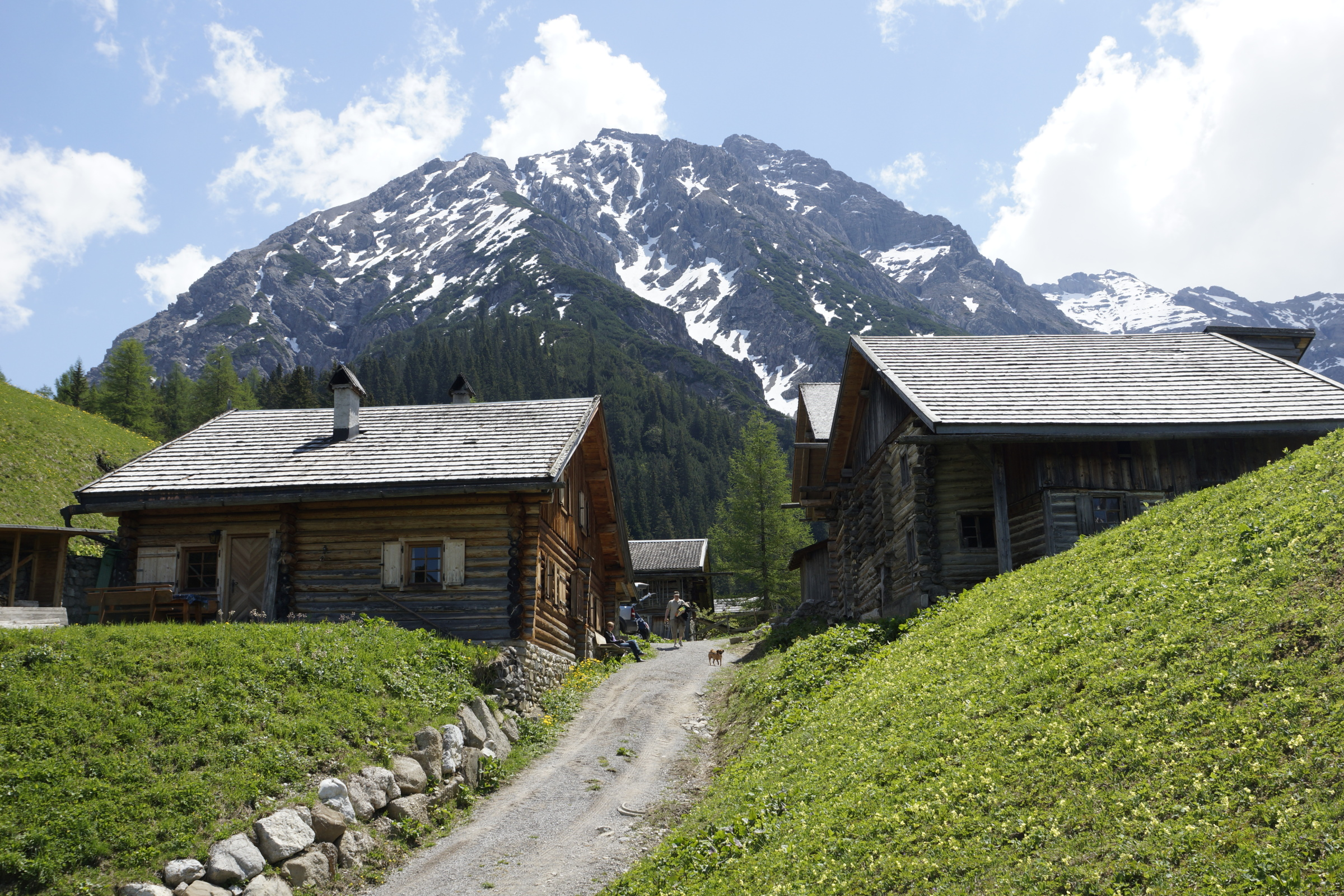 Almenensemble Ebele oberhalb der nicht mehr bewohnten Häuser von Pfafflar liegen diese alten Wohngebäude. Heute werden sie als Wochenendwohnungen genutzt. Im Hintergrund der nordwestliche Ausläufer des Imster Muttekopfs, rechts hinten die Kübelwände